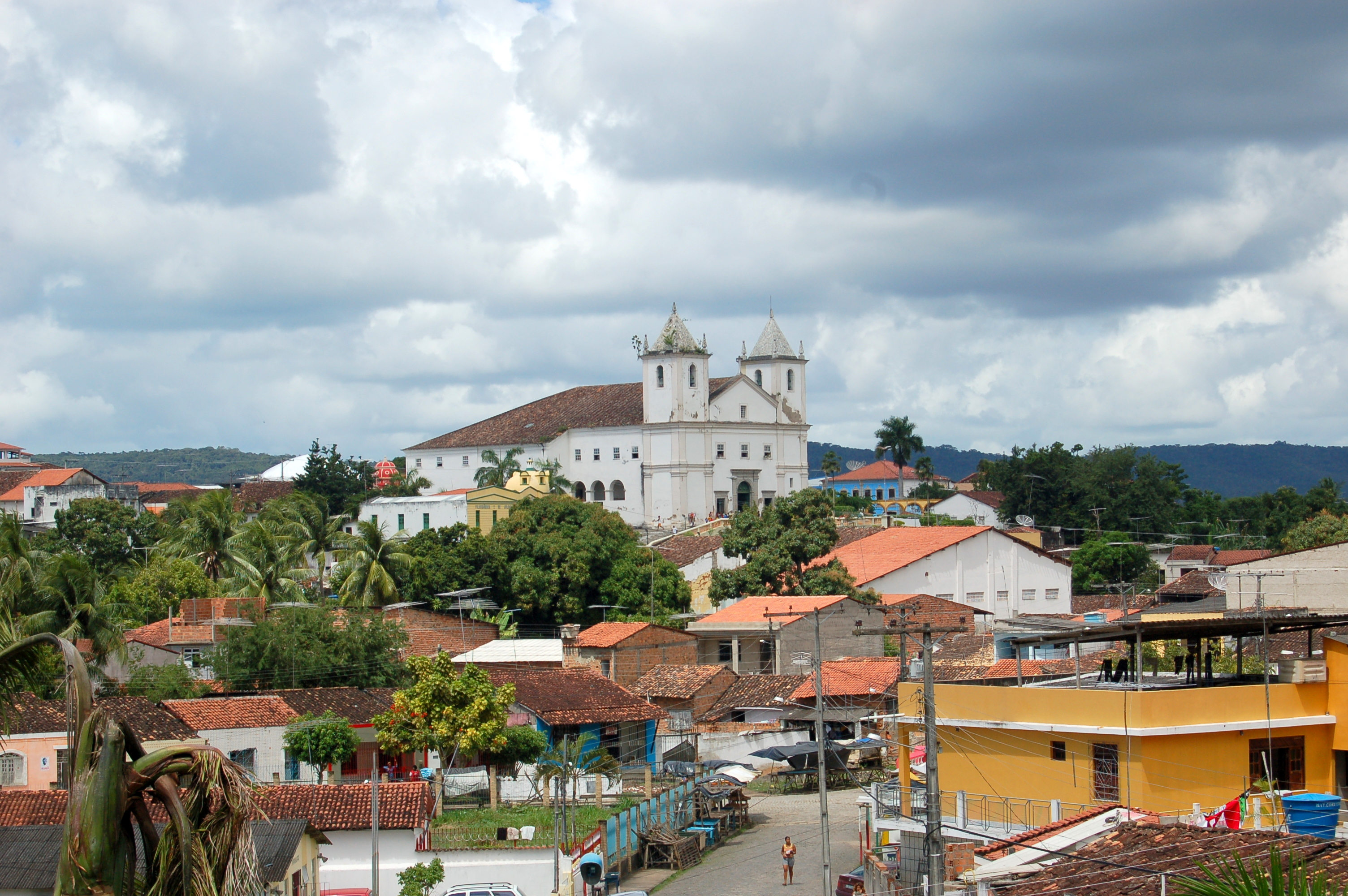 Maragojipe Ba. Panorâmica. Foto: Rita Barreto - Setur